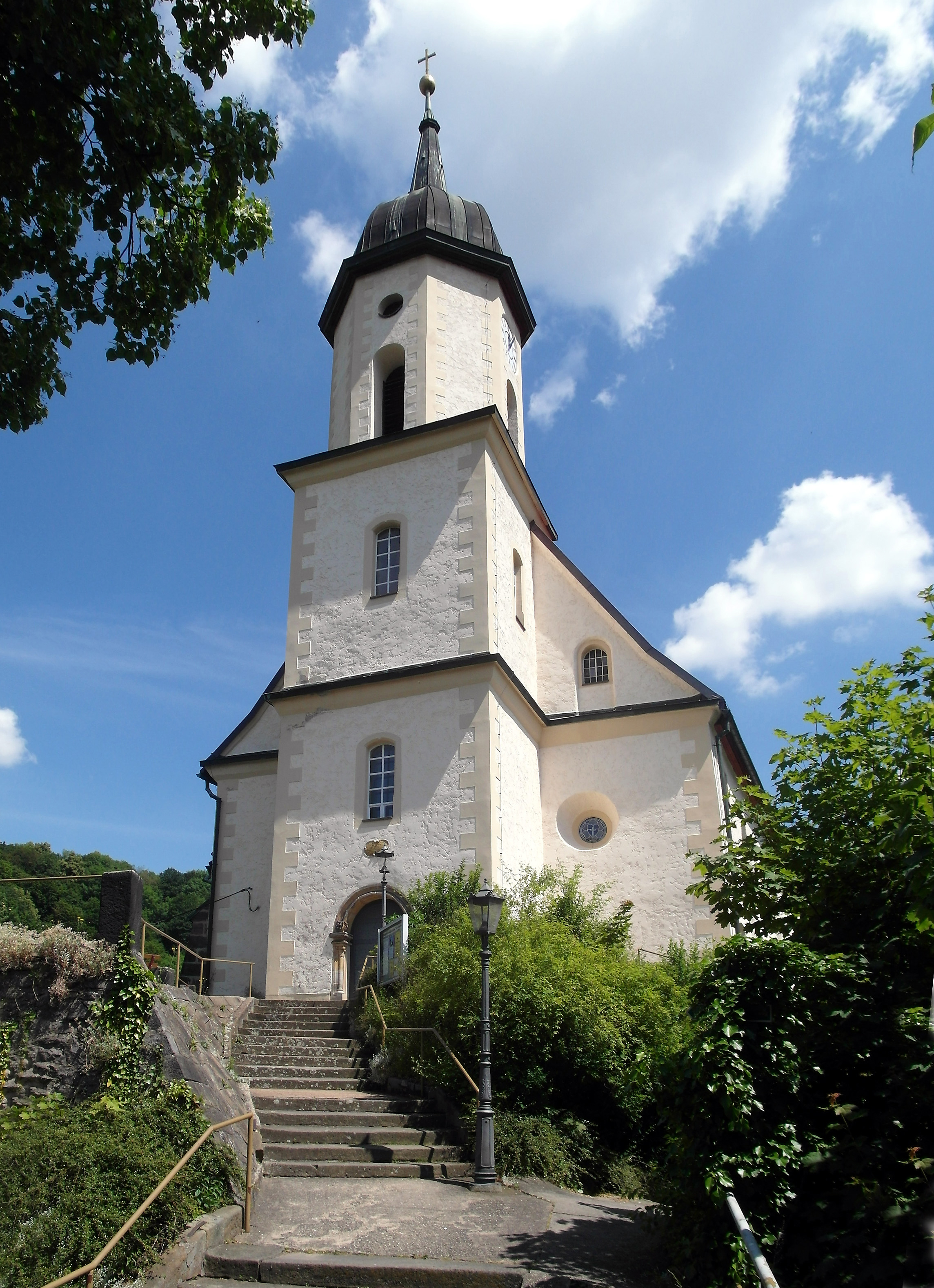 18.06.2014 01737 Tharandt: Bergkirche Zum Heiligen Kreuz, 1626-1629 auf den Mauern der Unterburg erbaut und 1631 geweiht. Das spätromanische Portal (um 1230) wurde aus der ehemaligen Burg übernommen (GMP: 50.983414,13.582738).[SAM4740.JPG]20140618315DR.JPG(c)Blobelt